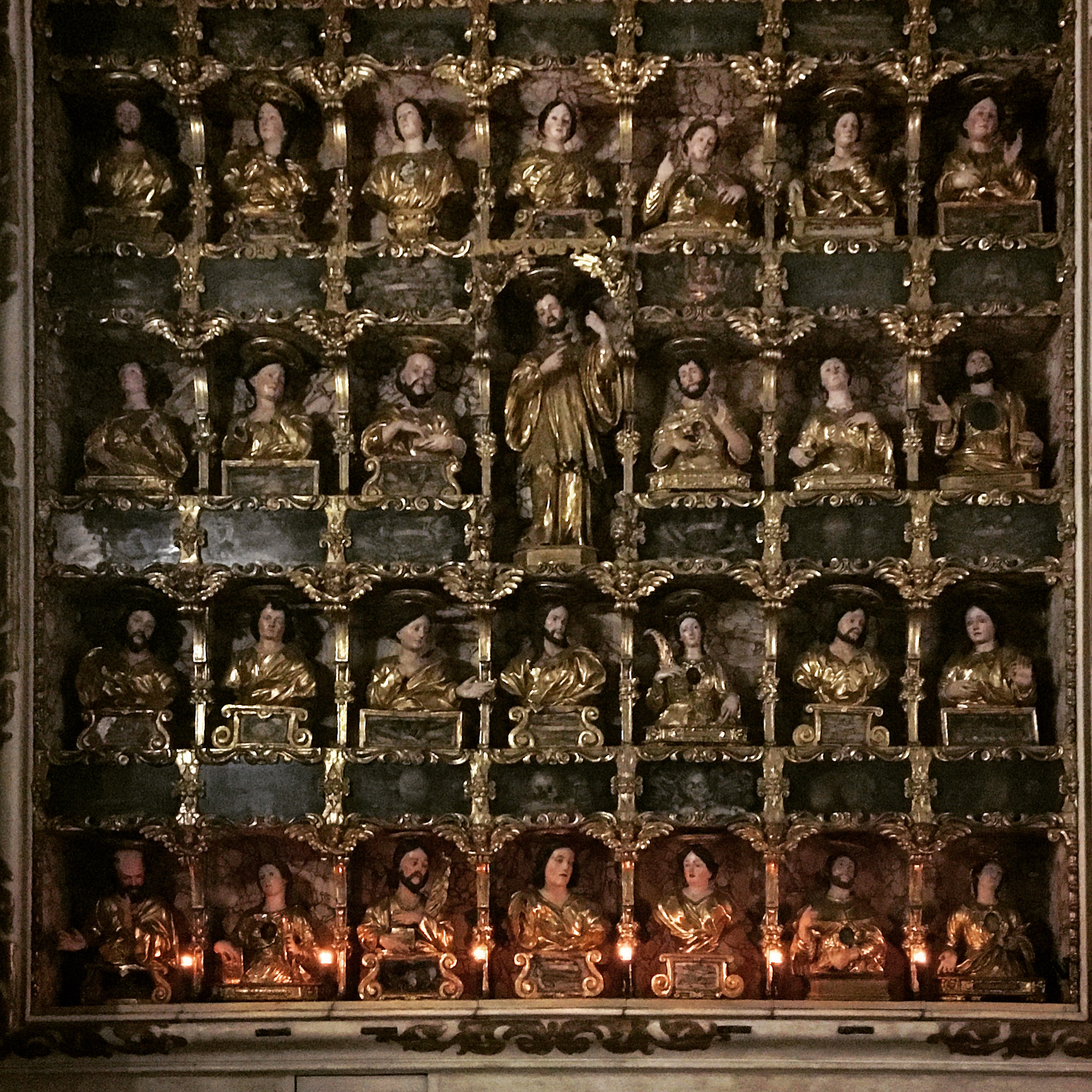 Lipsanoteche, opera di Giovan Domenico Vinaccia. Cappella di San Francesco De Geronimo - Chiesa del Gesù Nuovo, Napoli